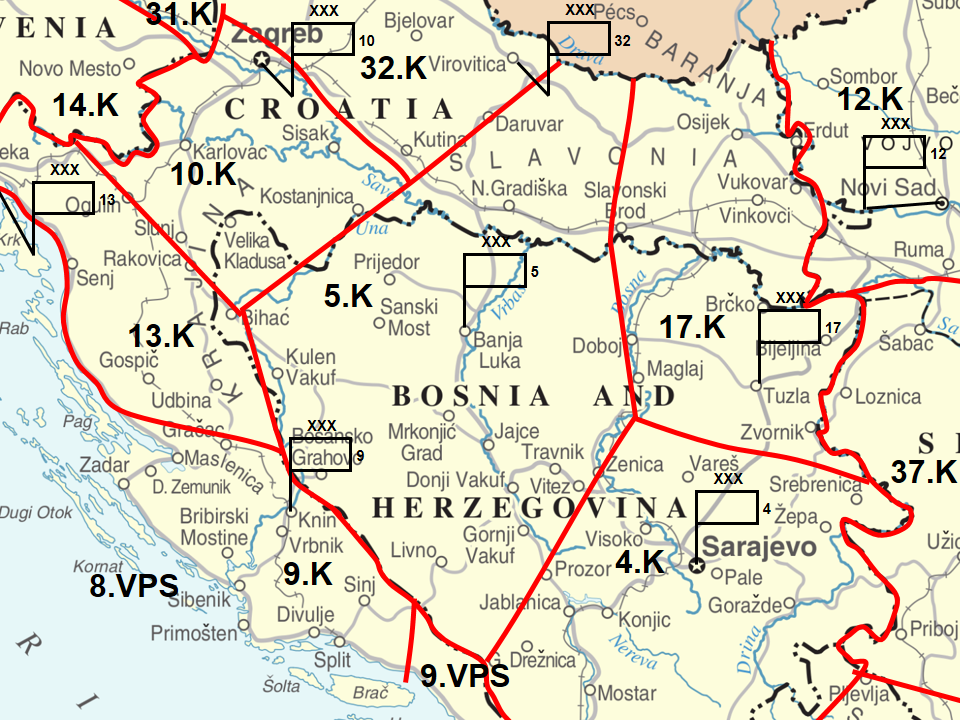 Sobre la base de Karavelic, Vahid. Military Expert Opinion. Documento ICTY Caso IT-01-47T. Sarajevo, febrero 2005. Página 208